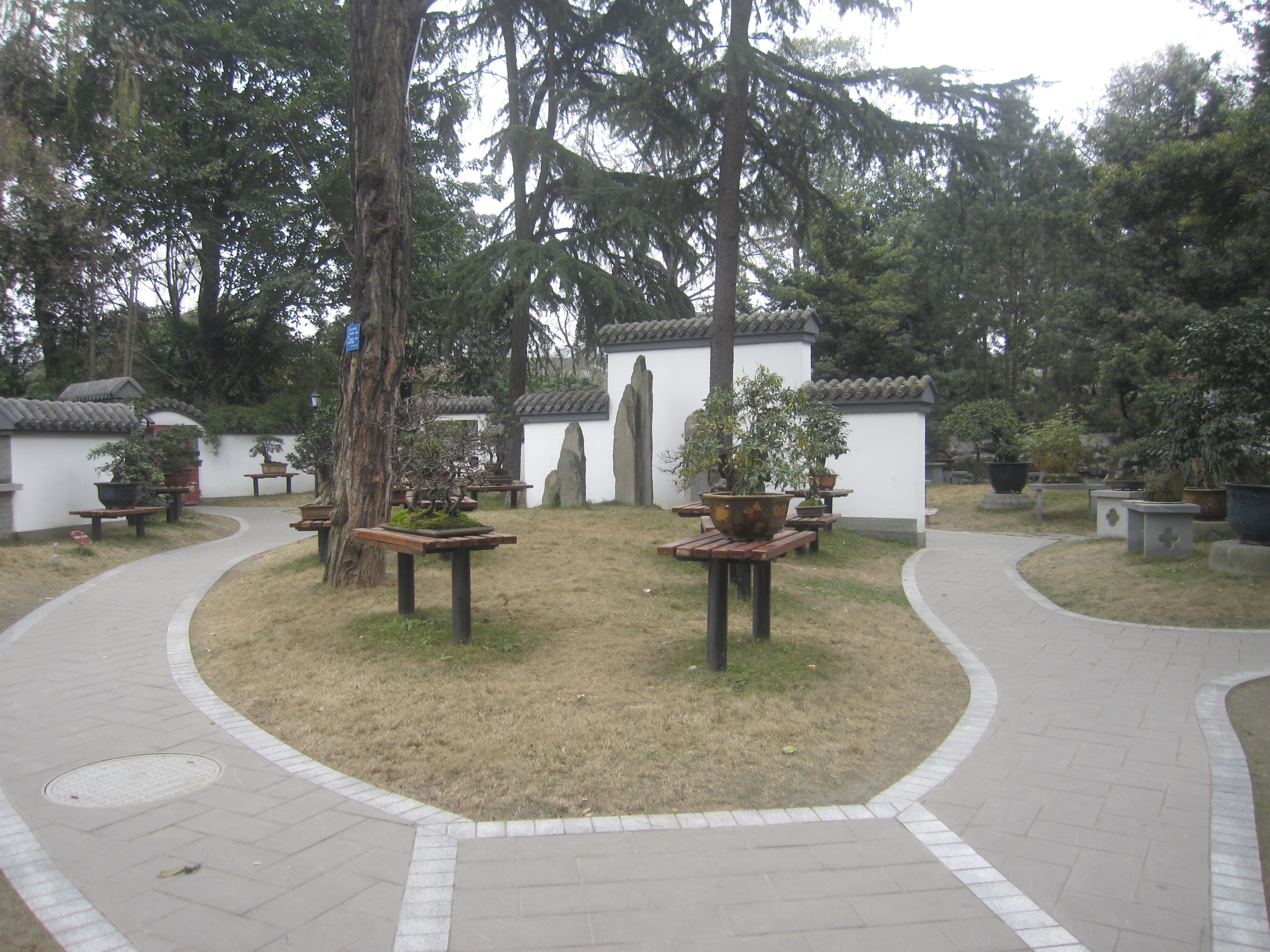 百花潭公园－盆景园